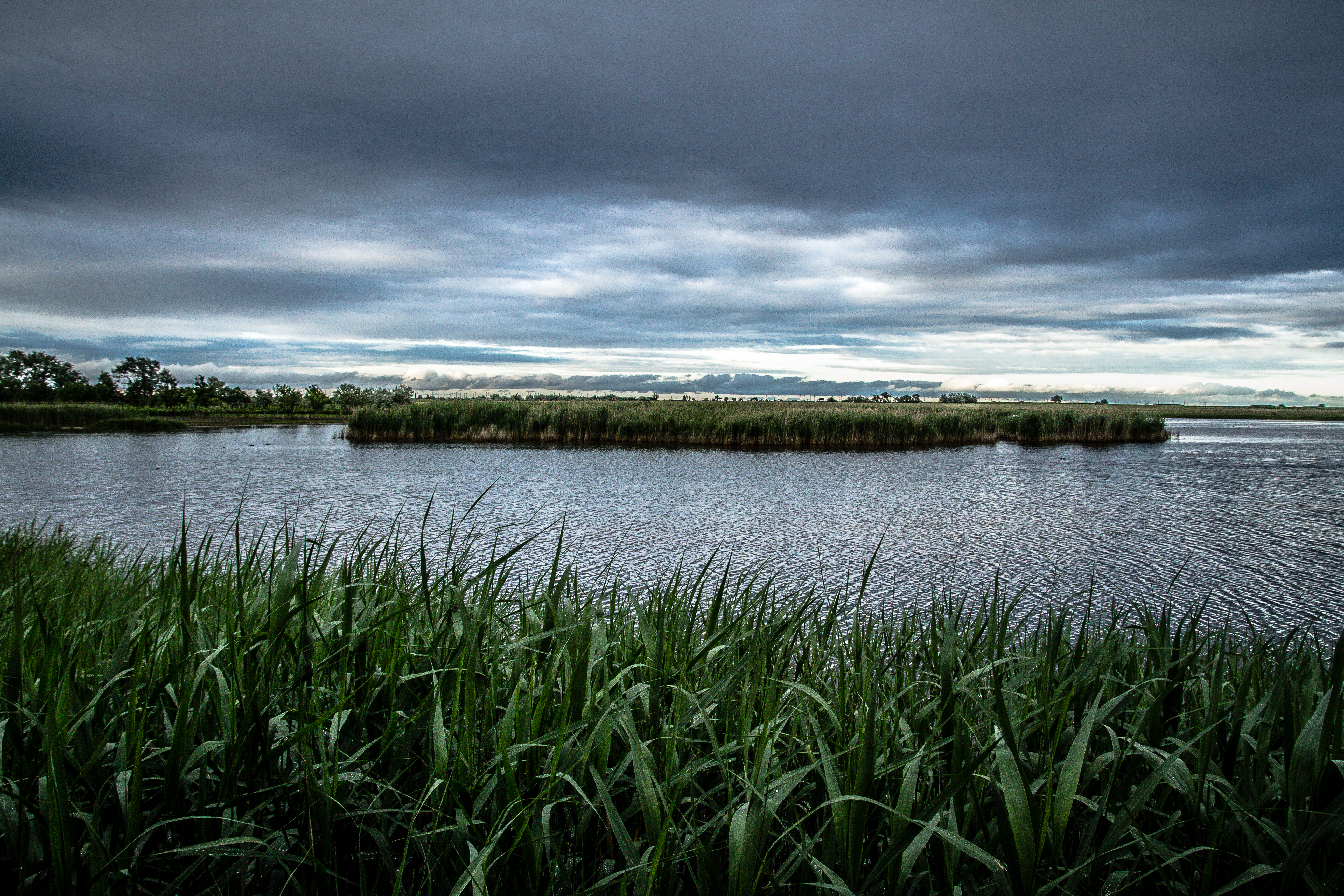 Nationalparktypische Lacke im Bereich des oberen Stinkersees. This file shows the National Park Neusiedler See-Seewinkel in Austria.